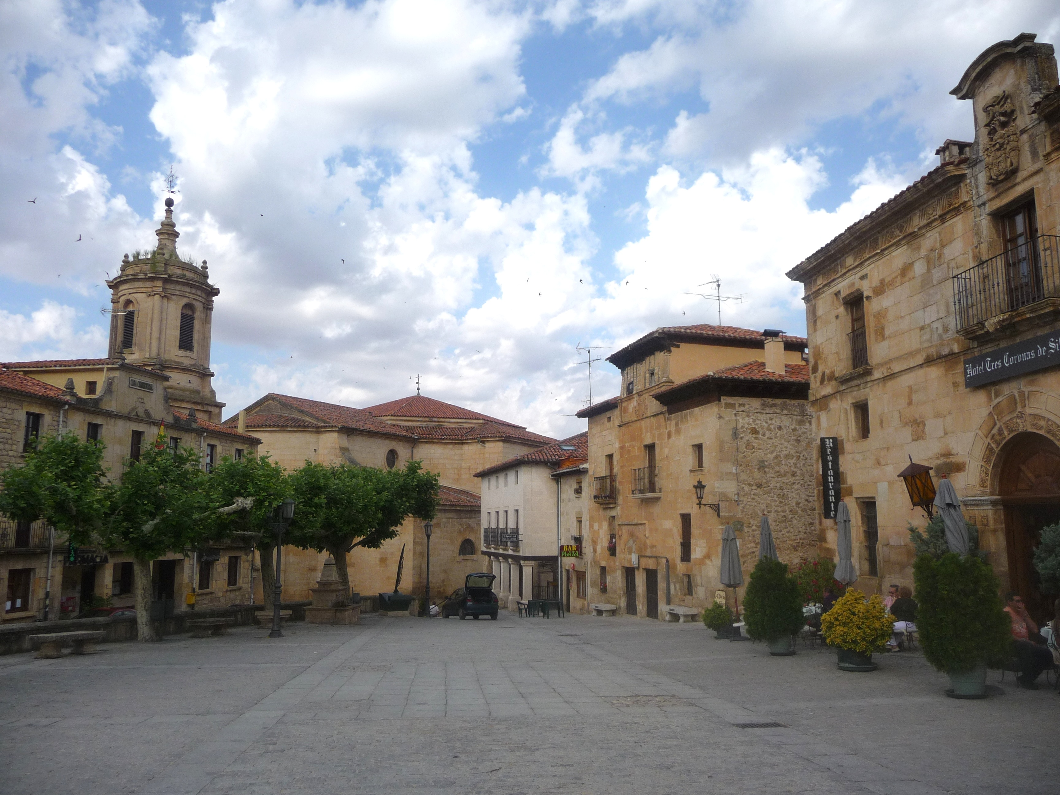 Place